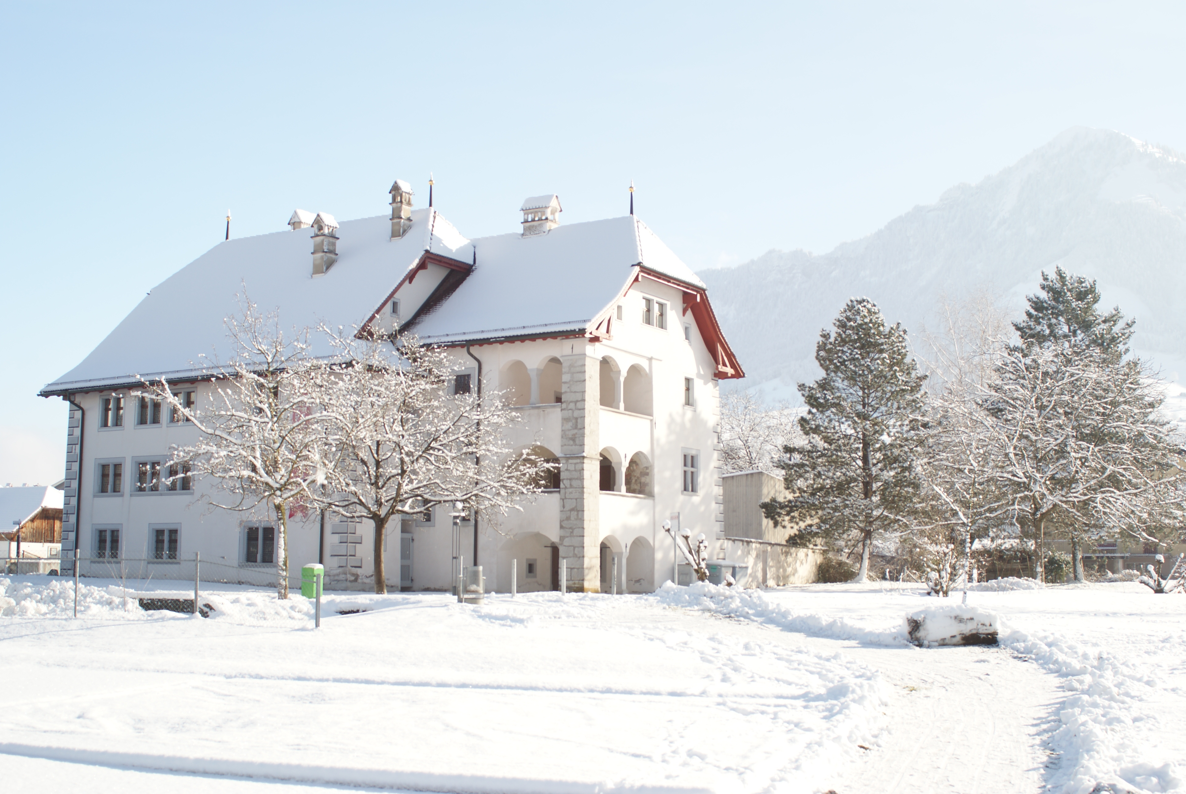 Blick des Winkelriedhauses in Stans von Nordwesten. Im Hintergrund das Buochserhorn.